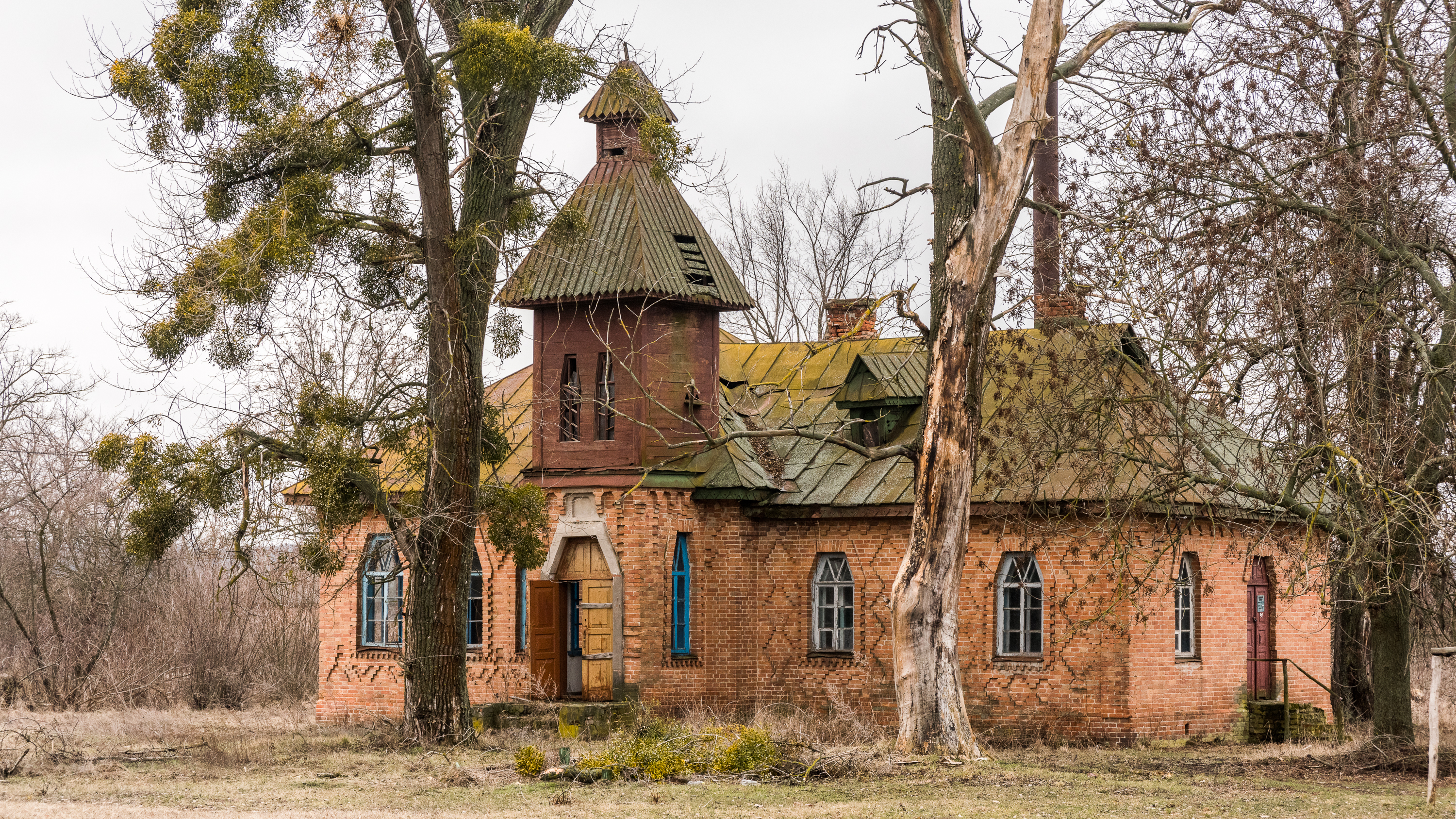 Однокомплектна земська школа в селі Піски-Удайські Чорнухинського району Полтавської області. Стиль - український архітектурний модерн. Архітектор Опанас Сластьон.